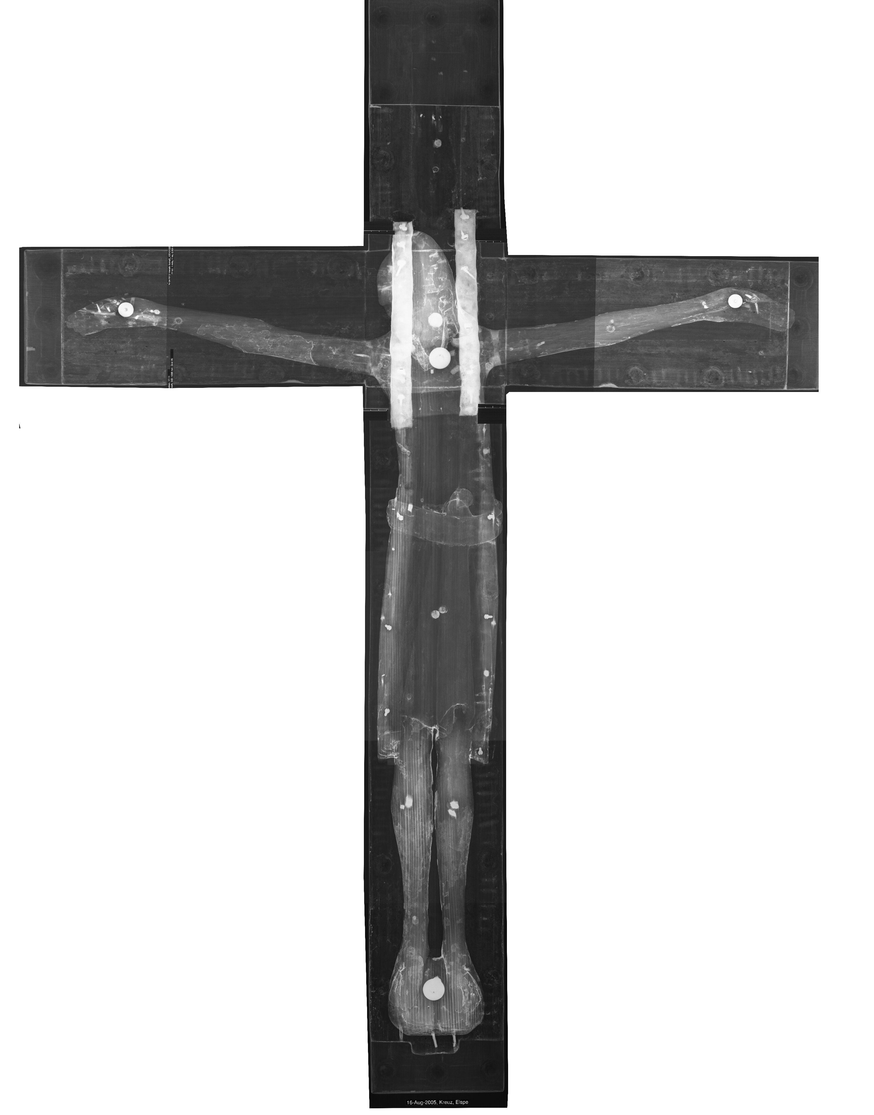 Zusammenschnitt der Röntgenbilder vom Mirakelkreuz Elspe Fotomontage--Wolfgang Poguntke 09:51, 28. Dez. 2007 (CET)